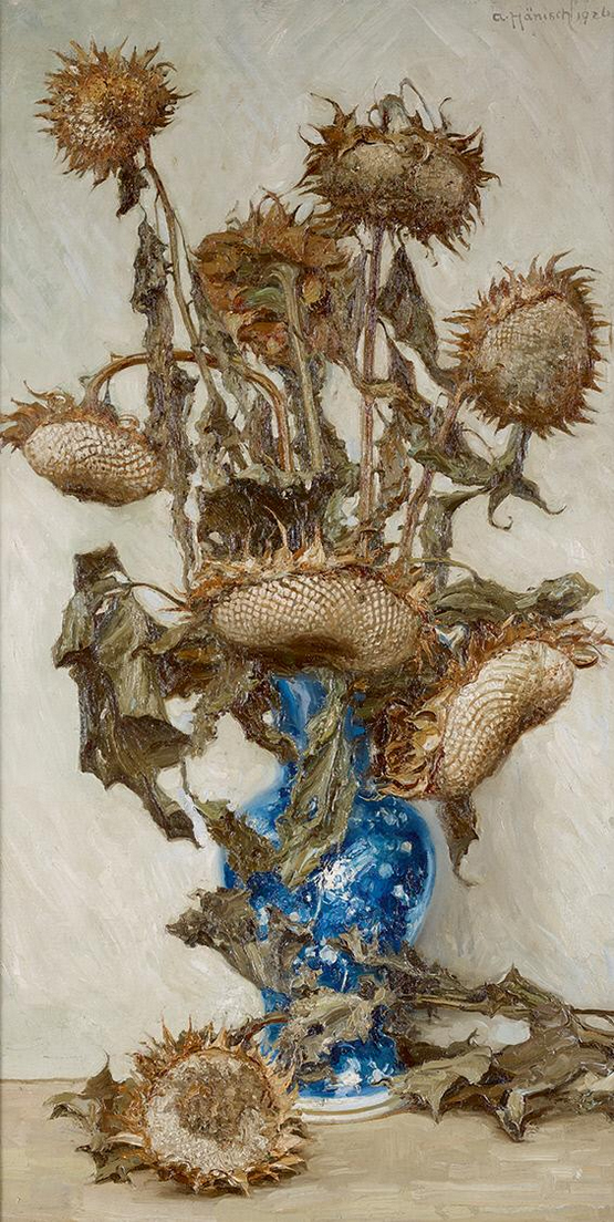 Helianthus - Verwelkte Sonnenblumen